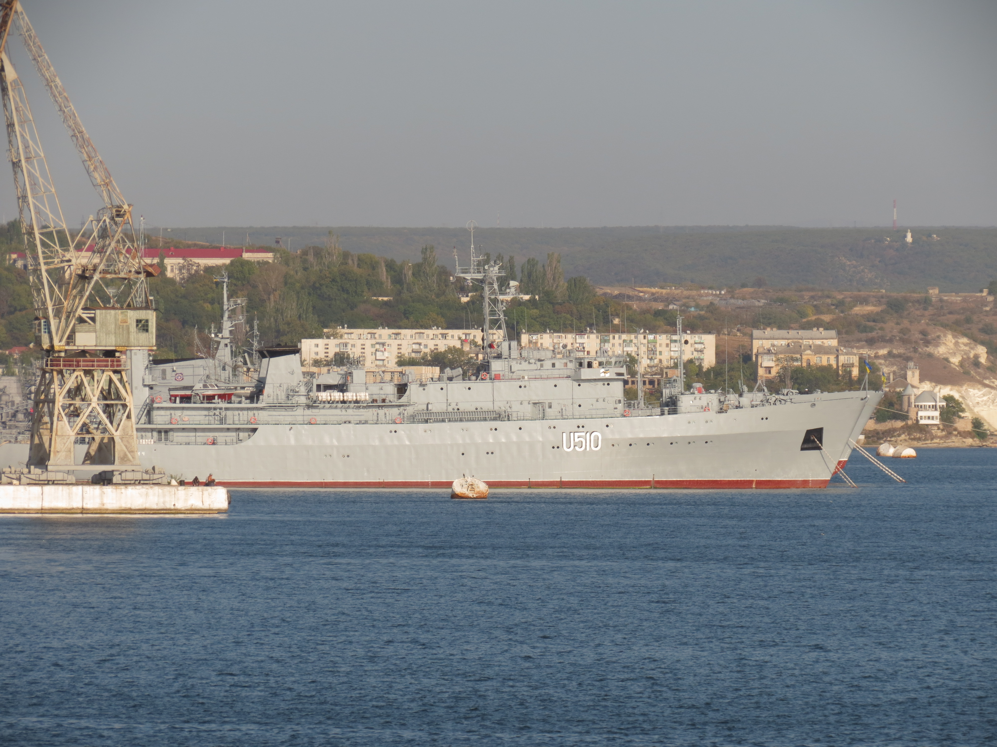 Корабль управления Славутич. Севастополь, Украина